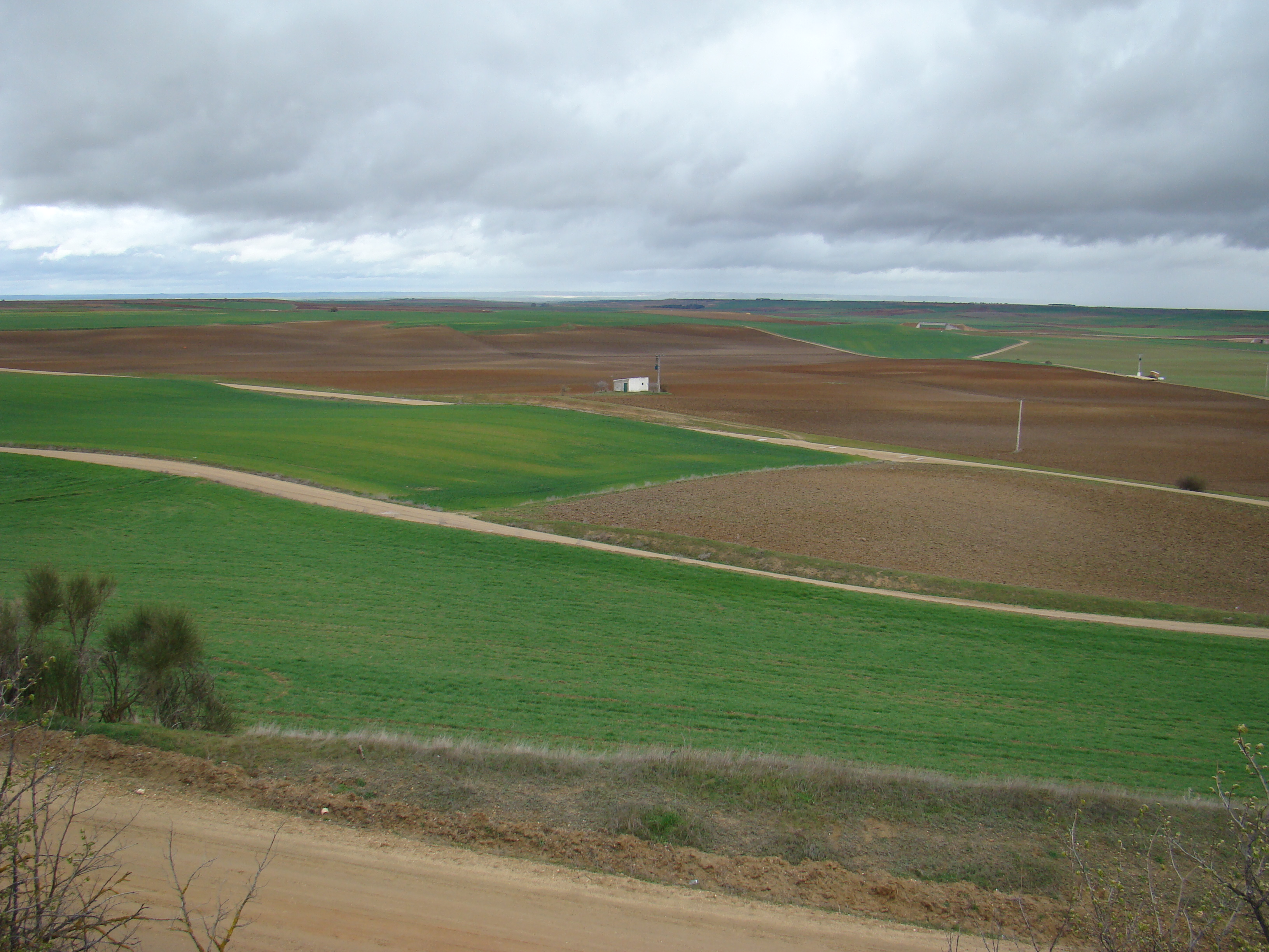 Campos de labor de Nava del Rey, provincia de Valladolid, España.